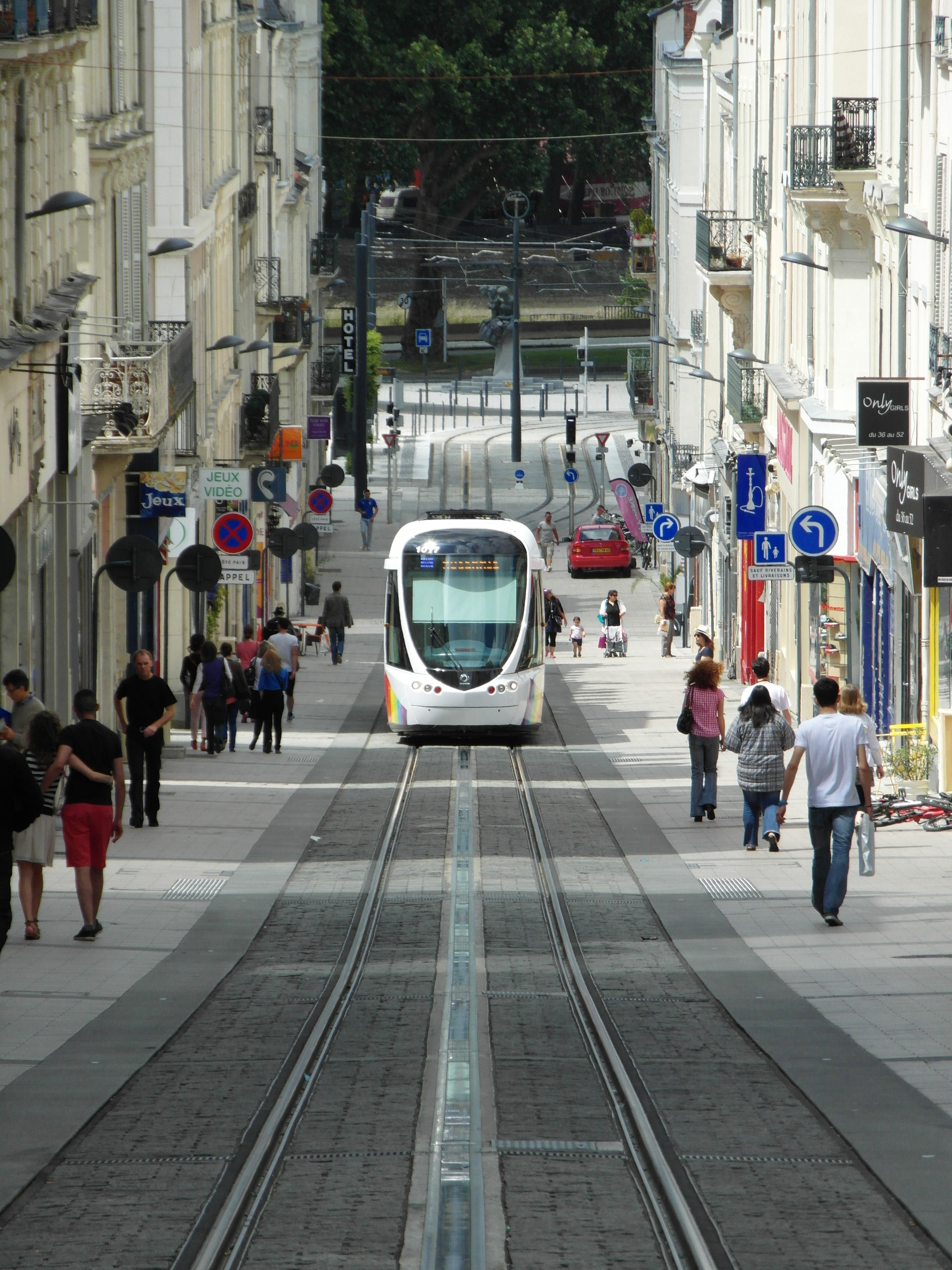 Straßenbahn Angers - Innenstadtabschnitt Place du Ralliement und Rue de la Roë - eingleisige Streckenführung - APS - Stromschiene